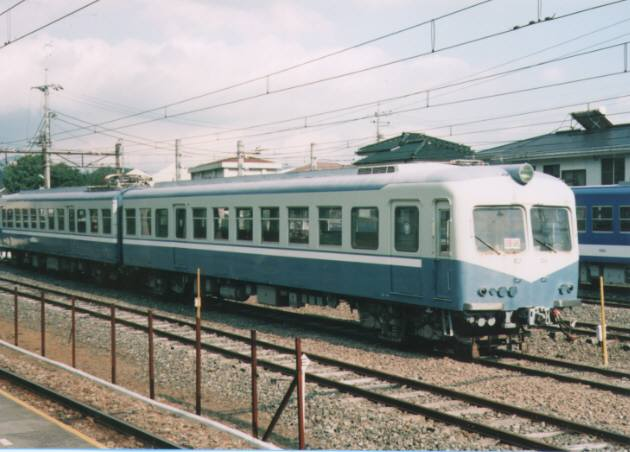 Fujikyuko Co., EMU type 3100 at Kawaguchiko Sta.